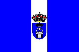 Bandera de Pozuelo del Rey, en Madrid (España)